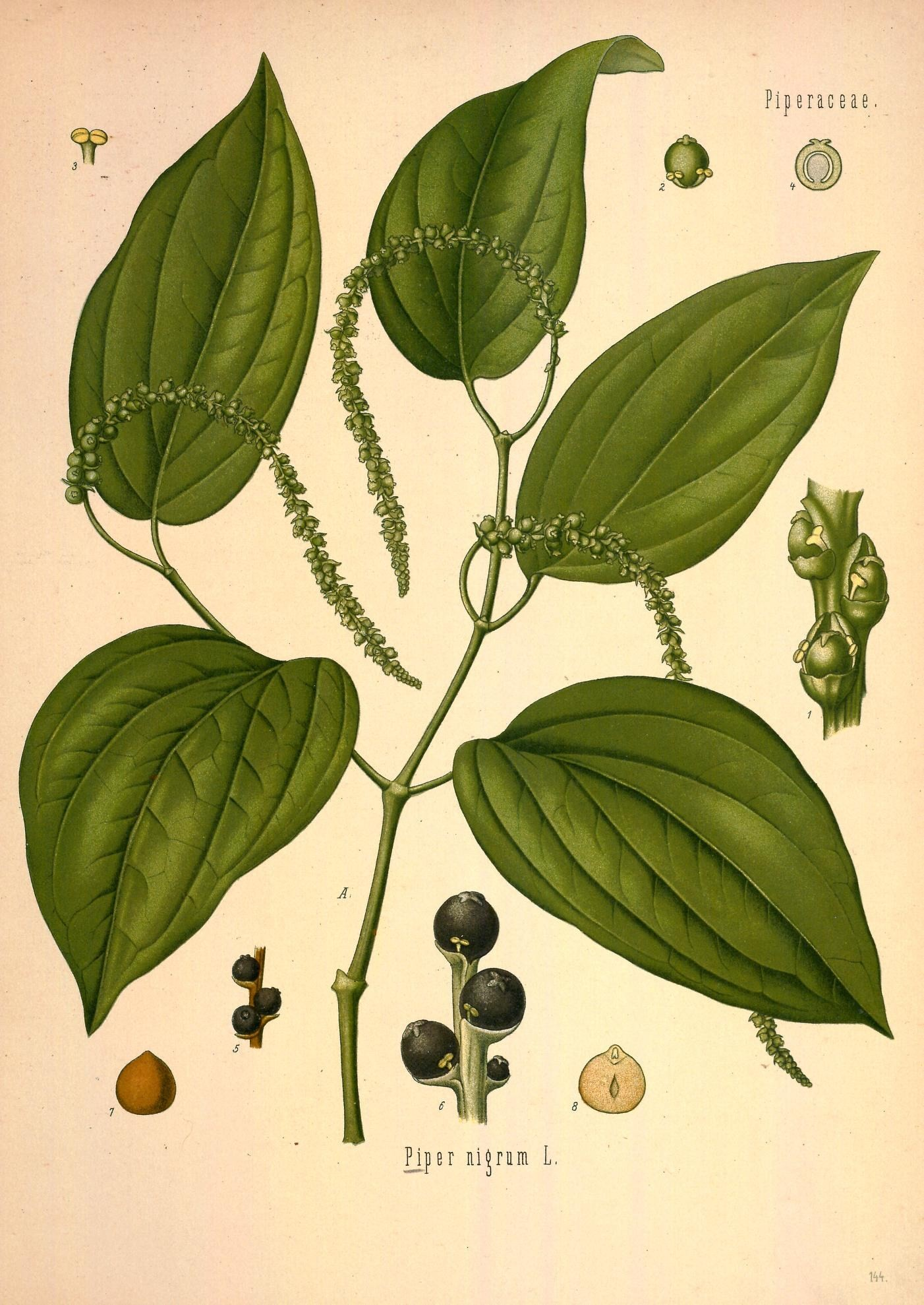 Schwarzer Pfeffer. A blühender Zweig, nat. Grösse; 1 Theil der Blüthenähre, vergrössert (nach Bâillon aus Luerssen); 2 Fruchtknoten, mit Staubgefäss, desgl.; 3 Staubgefäss, desgl.; 4 junge, noch grüne Frucht im Längsschnitt, desgl.; 5, 6 Theil der Fruchtähre, nat. Grösse und vergrössert (der Farbenton ist falsch; er müsste bei 5 roth, bei 6 grün sein; Fig. 6 nach Hayne); 7 Frucht ohne Fruchtschicht, vergrössert; 8 dieselbe im Längsschnitt, desgl.